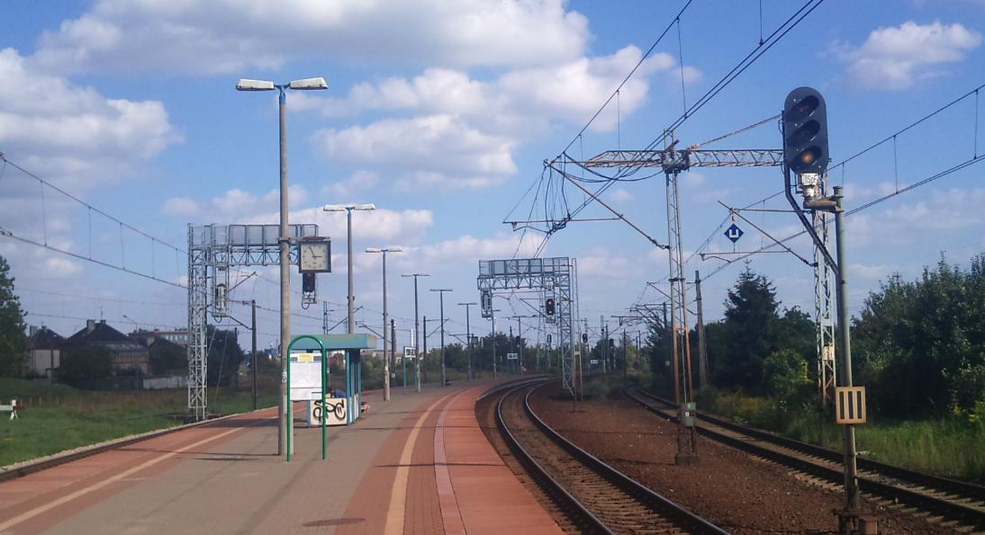 Peron stacji Poznań Górczyn.